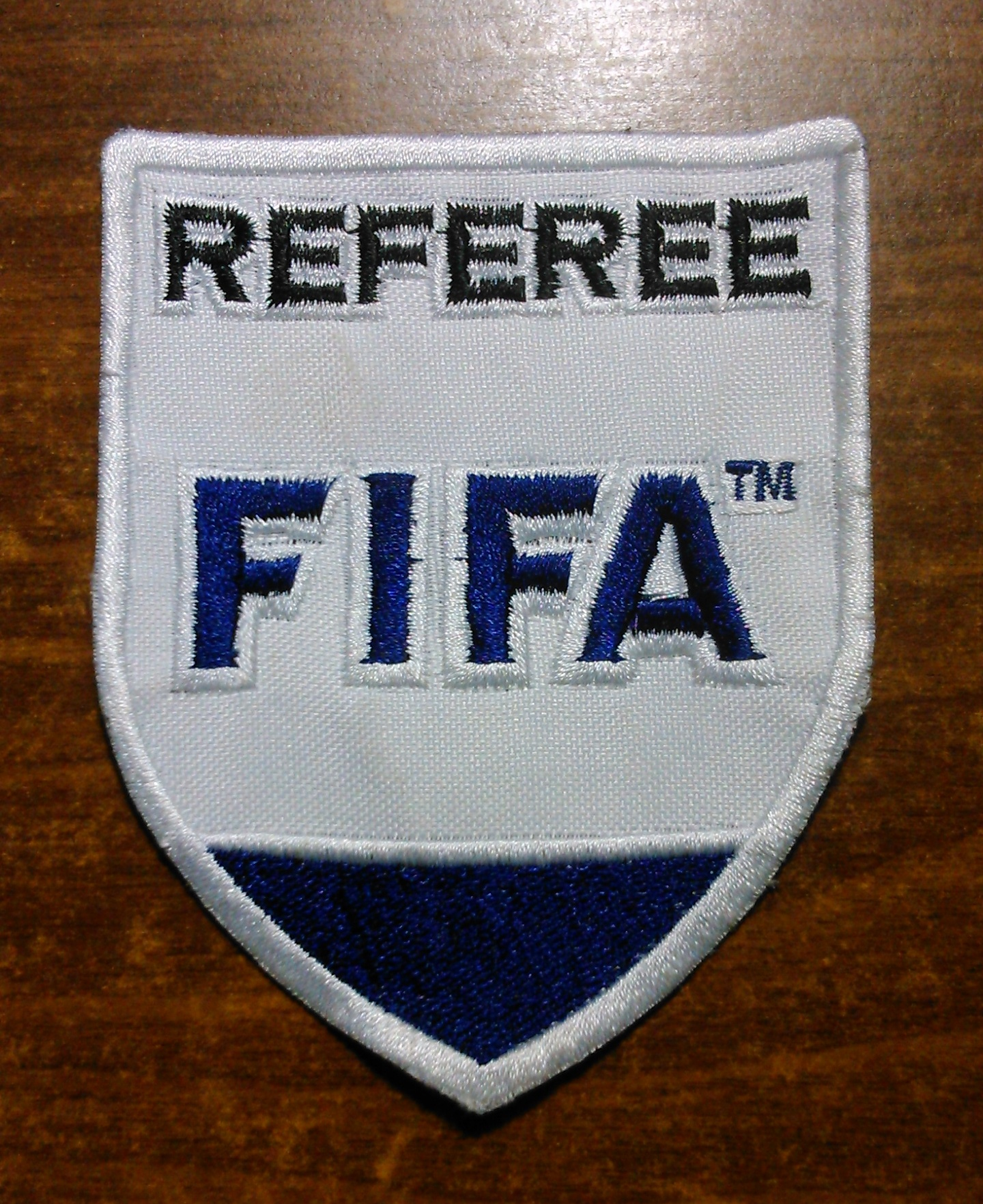 Gafete de FIFA Referee